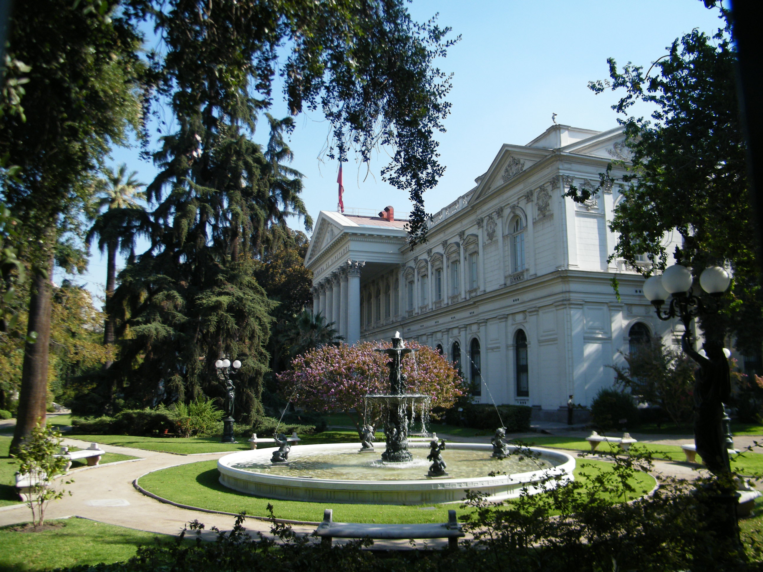 Ex Congreso Nacional y sus jardines This is a photo of a national monument in Chile: 835